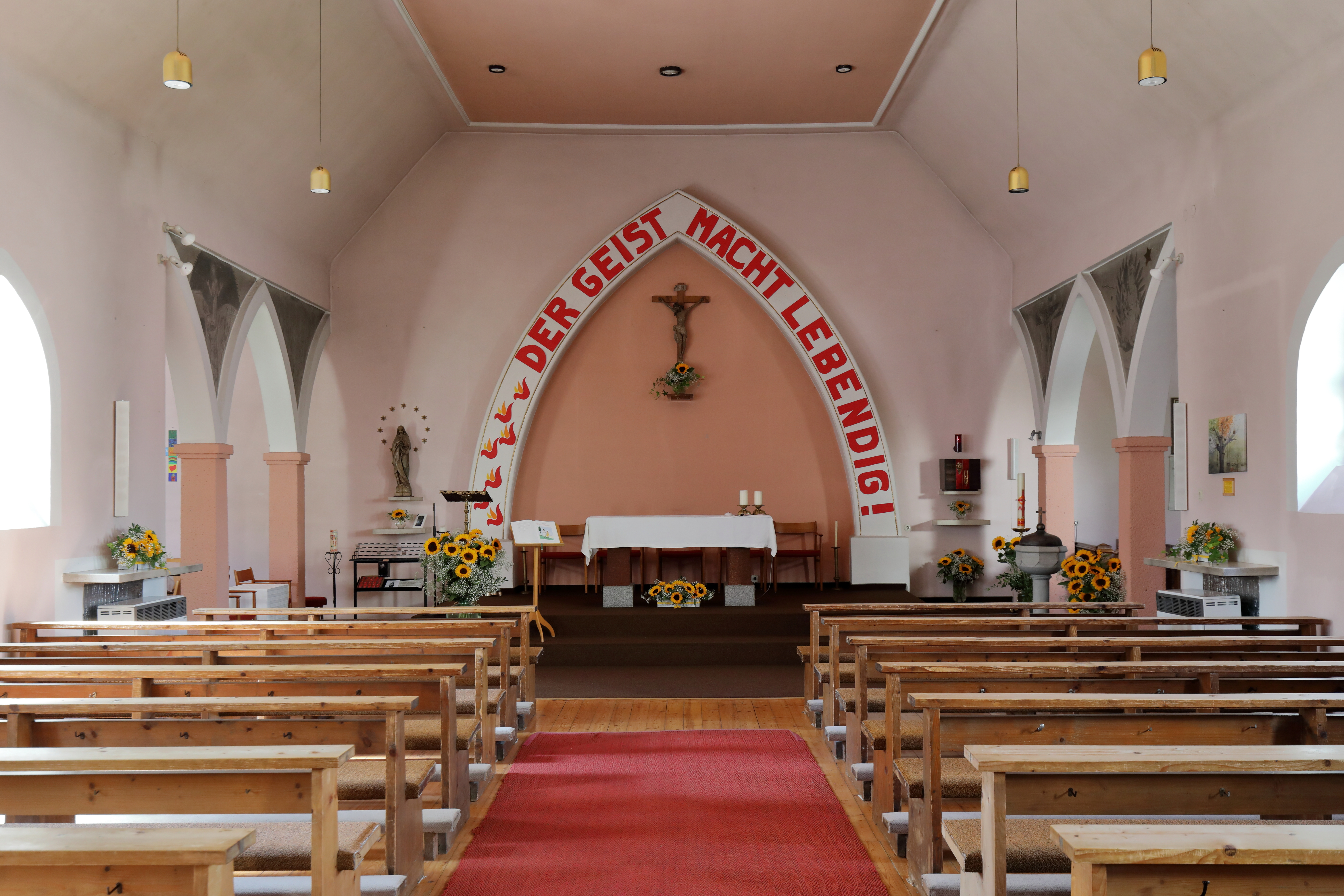 Innenansicht der röm.-kath. Pfarrkirche „Herz Mariä“ in Rannersdorf, ein Ortsteil der niederösterreichischen Stadt Schwechat.